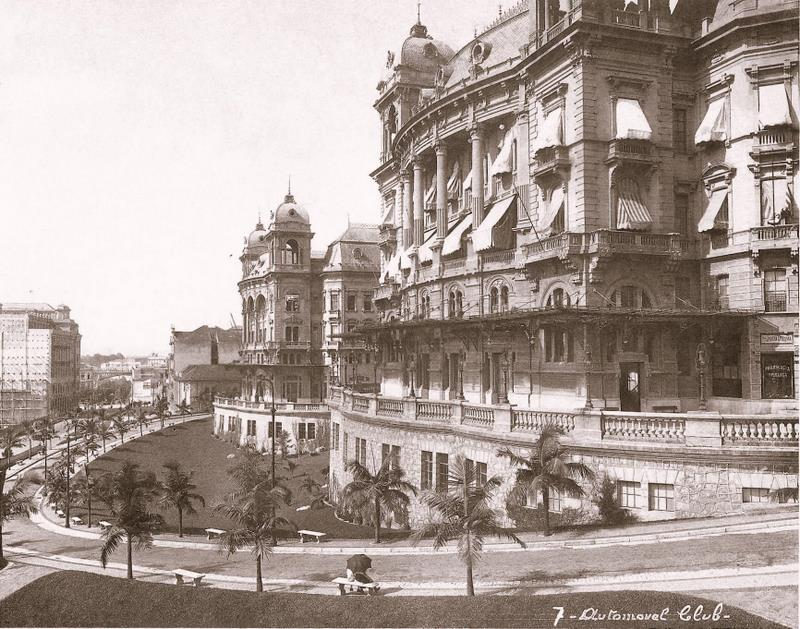 Palacete Prates (Automóvel Club) no Vale do Anhangabaú